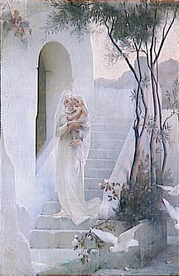 La Maison de la Vierge (1890), par Guillaume Dubufe, musée d'Orsay, Paris.